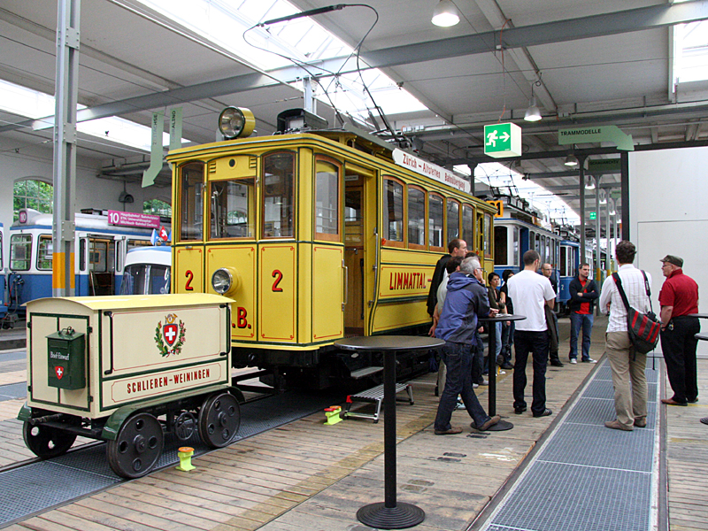 Im Tram-Museum Zürich, Depot Burgwies. Im Hintergrund eine Ce 2/2 der Limmattal-Strassenbahn LSB "Lisbethli" aus dem Jahre 1900 mit Postanhänger.